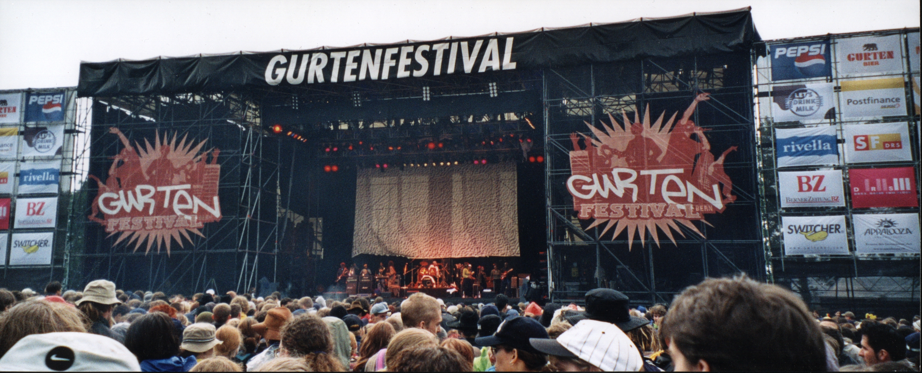 Hauptbühne des Gurtenfestivals 2000 (Bern/Schweiz)